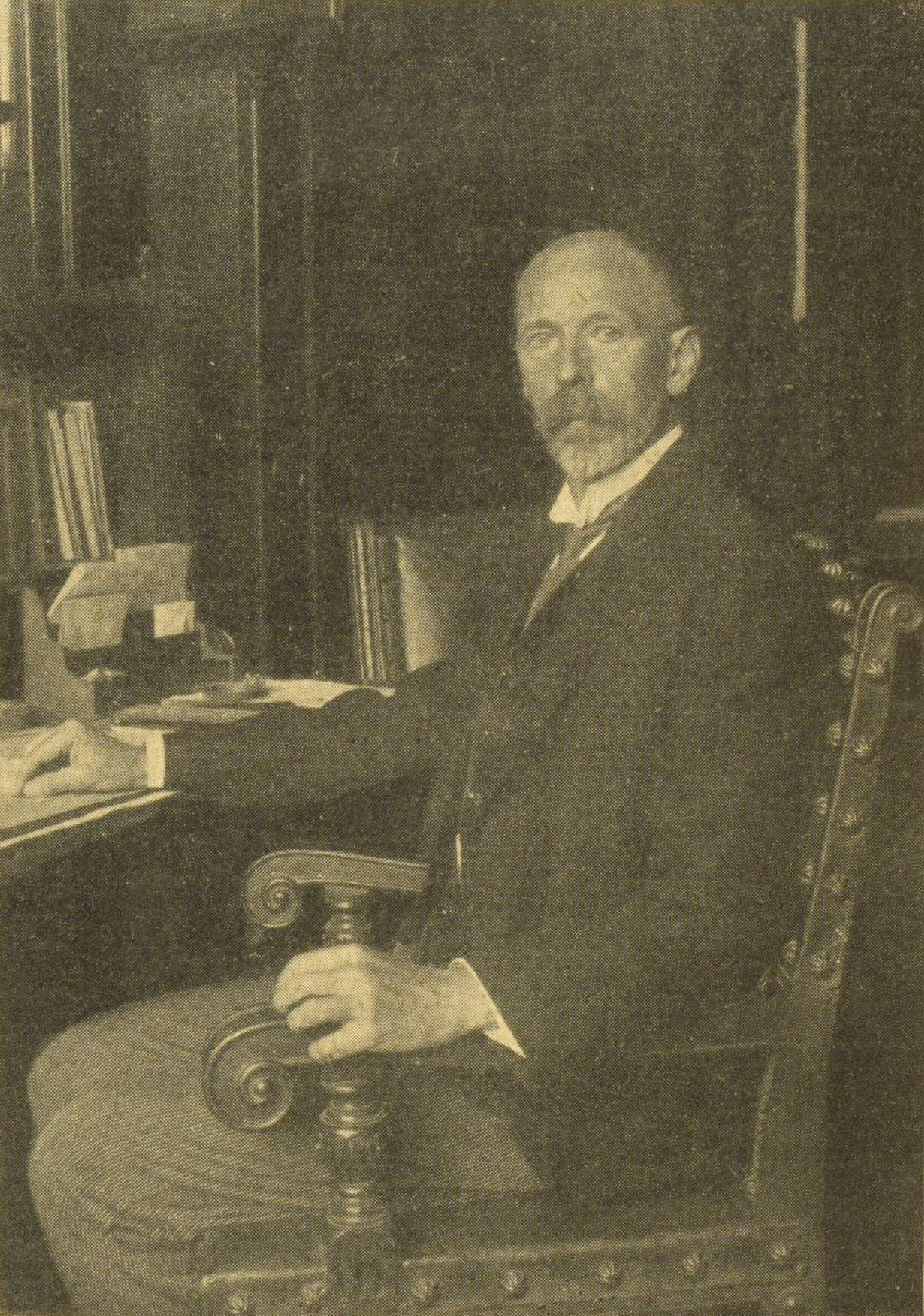 Karl Diener (1862–1928), Austrian geologist and paleontologist